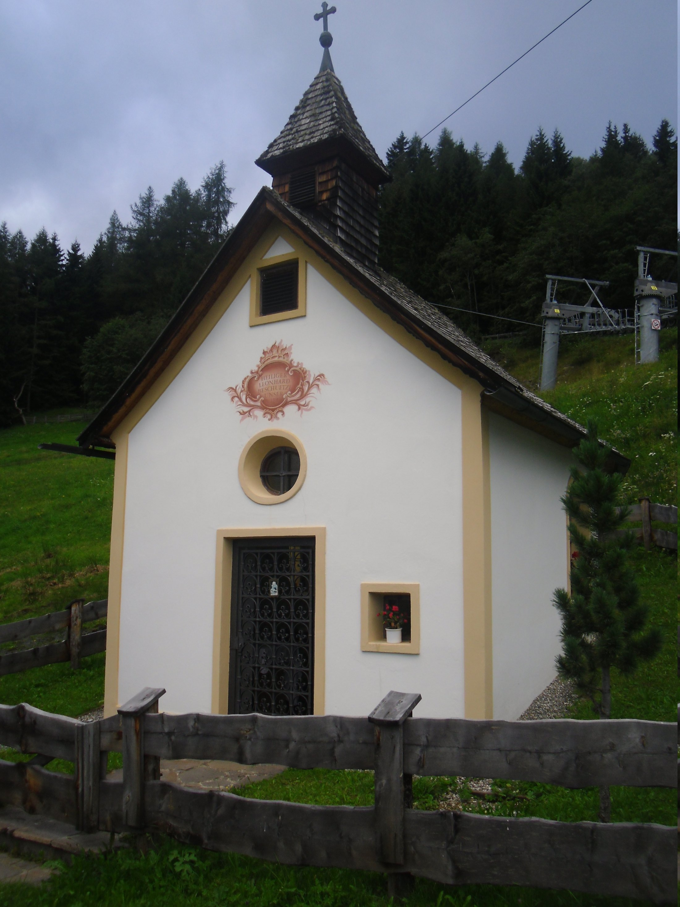 Nockhof-Kapelle, Leonhardskapelle